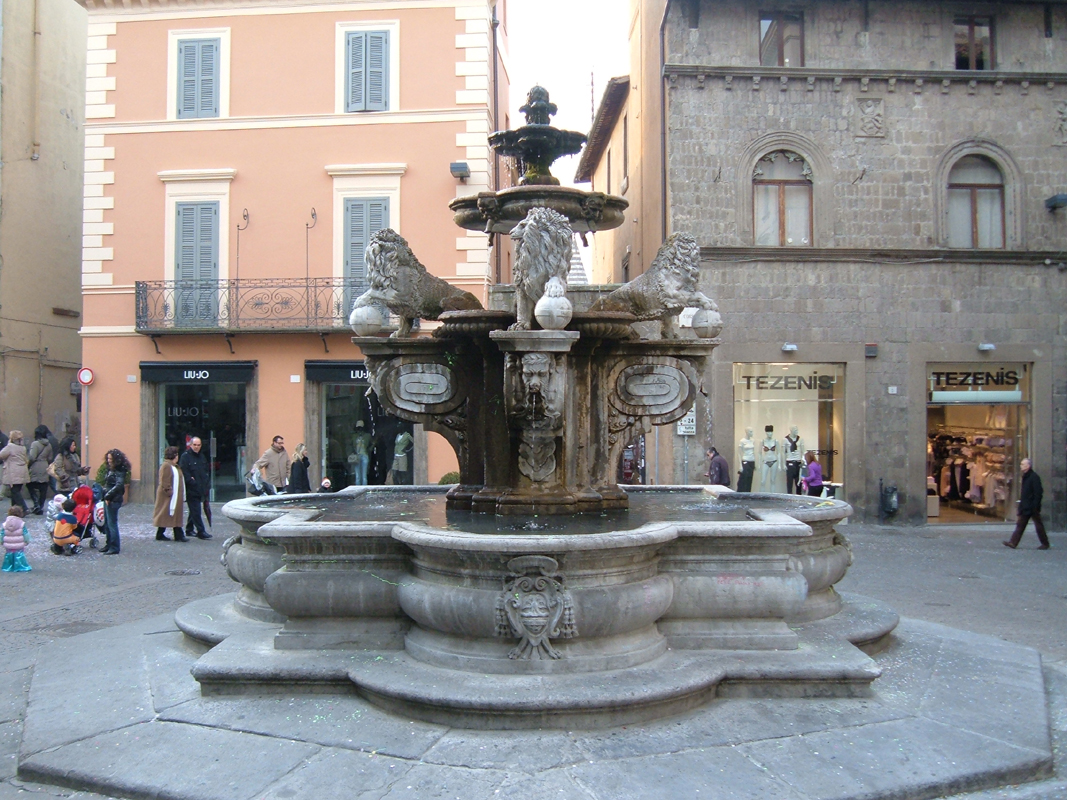 Fontana dei leoni, a Viterbo.